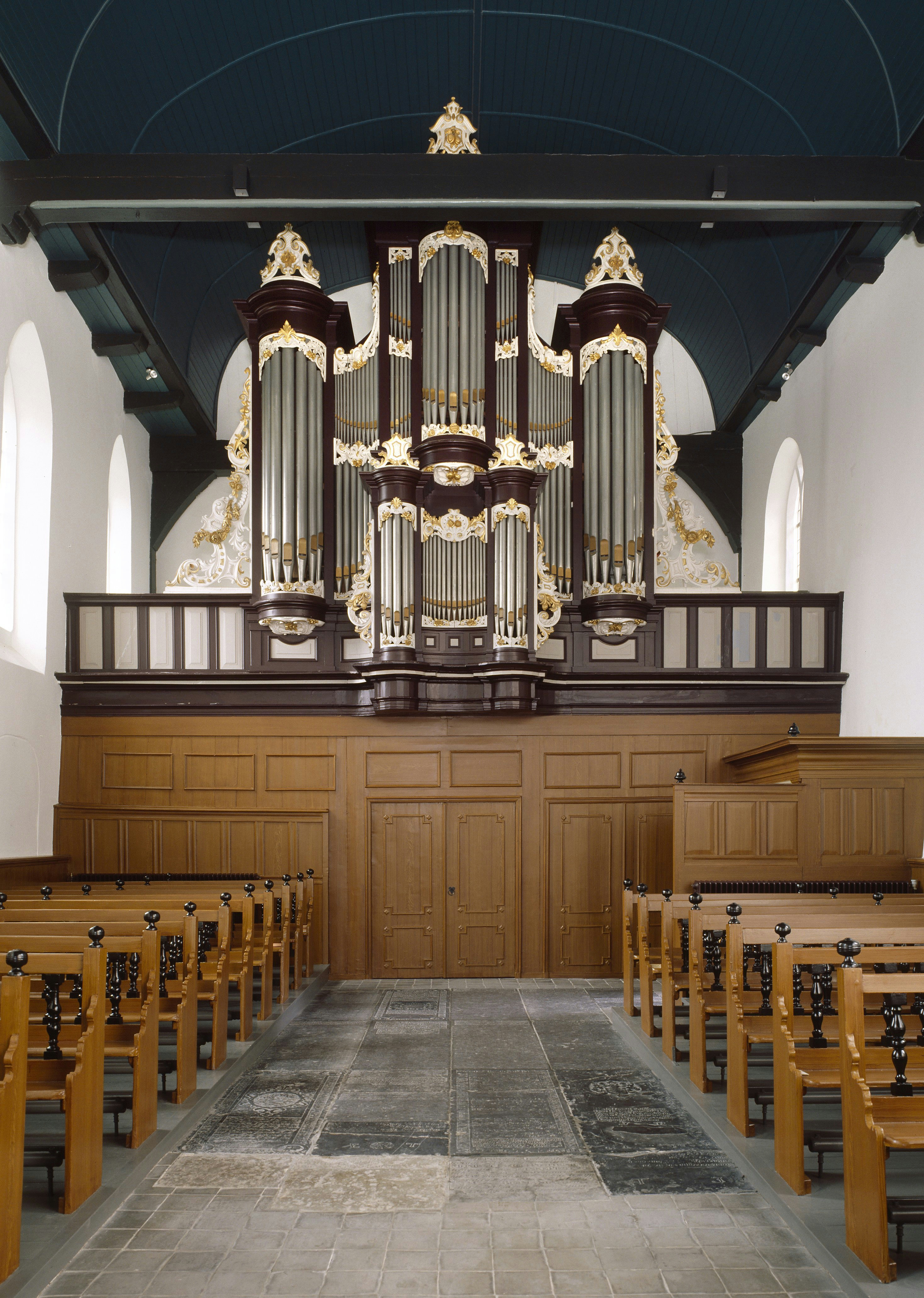 Nederlands Hervormde Kerk: Intenieur, aanzicht orgel, orgelnummer 81 (opmerking: Gefotografeerd voor Het Historische Orgel in Nederland 1872-1878, bladzijde 179)